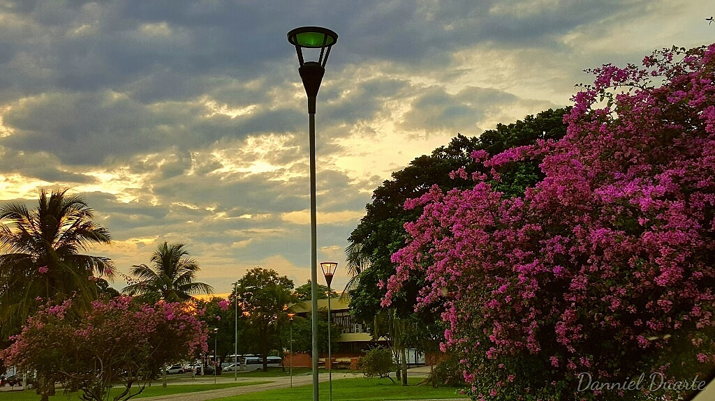 Praça dos girassois, Palmas-TO